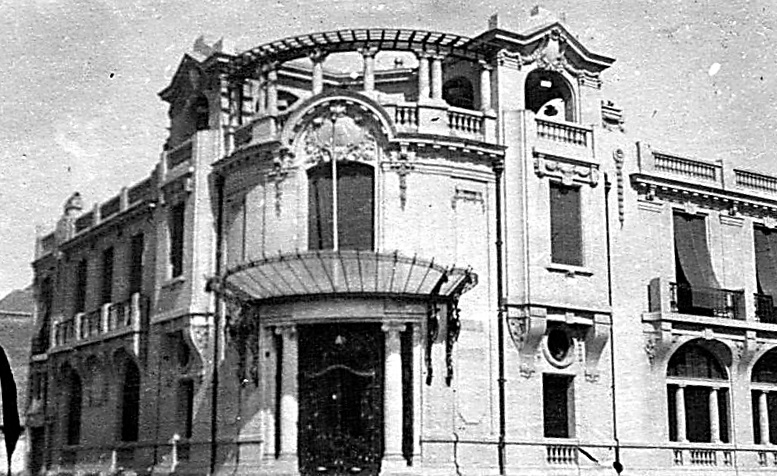 Casa Álamos hacia 1930